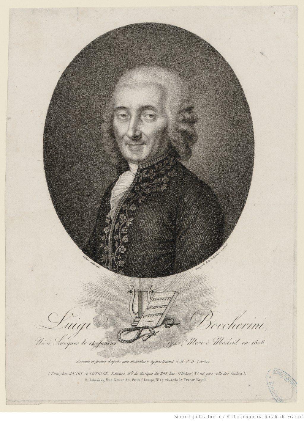 Portrait de Luigi Boccherini par Antoine Bourgeois de La Richardière, d'après Lefèvre.